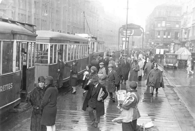 ADN-Zentralbild/ Archiv Berlin 1928 Blick vom Alexanderplatz auf die Straßenbahnhaltestelle Alexanderstrasse in Richtung Münzstraße, zwischen Keibel- und Prenzlauer-Straße; links das Warenhaus "Hermann Tietz". 34923-28